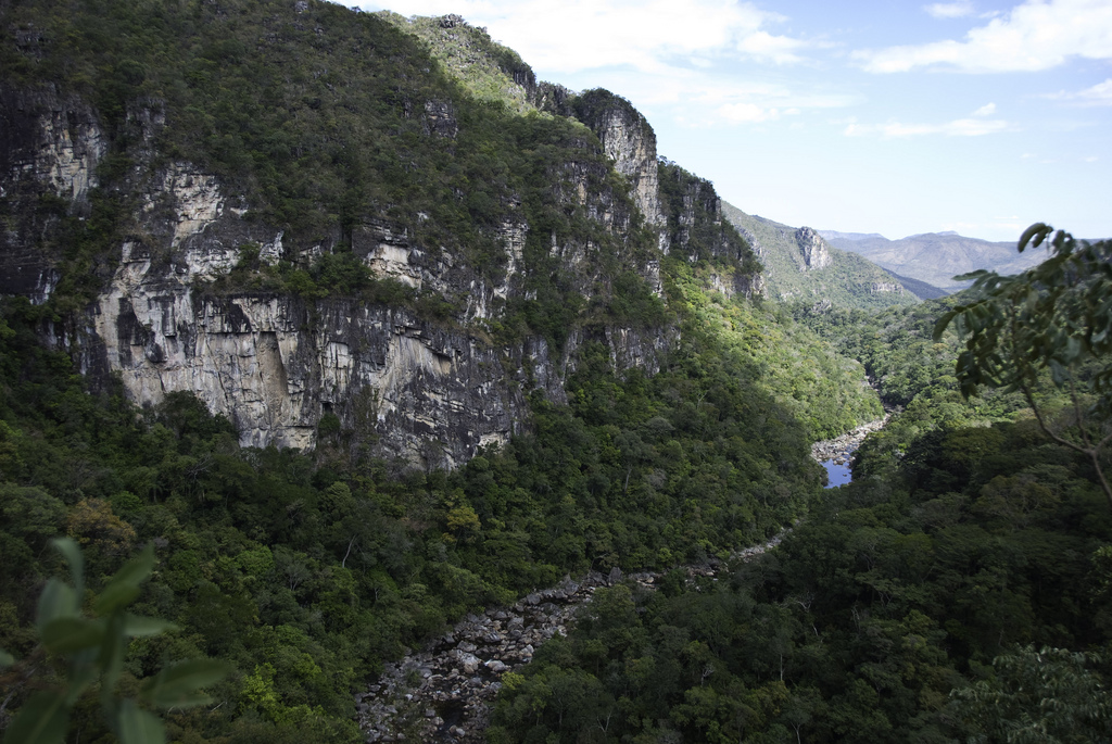 Chapada dos Veadeiros national park in Goias, Brazil.